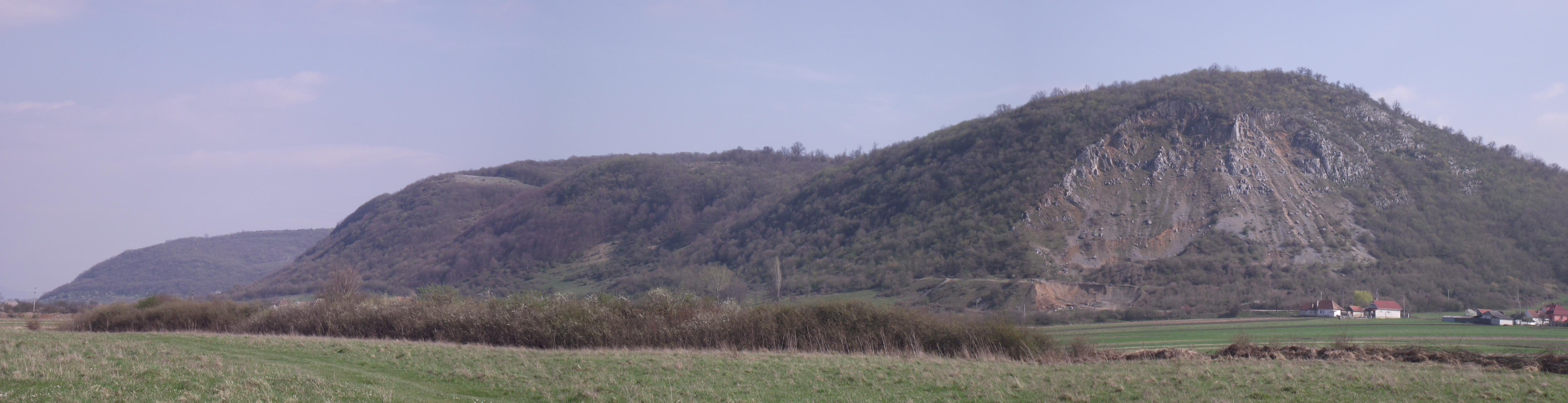 Király-erdő (Pădurea Craiului) Élesd irányából